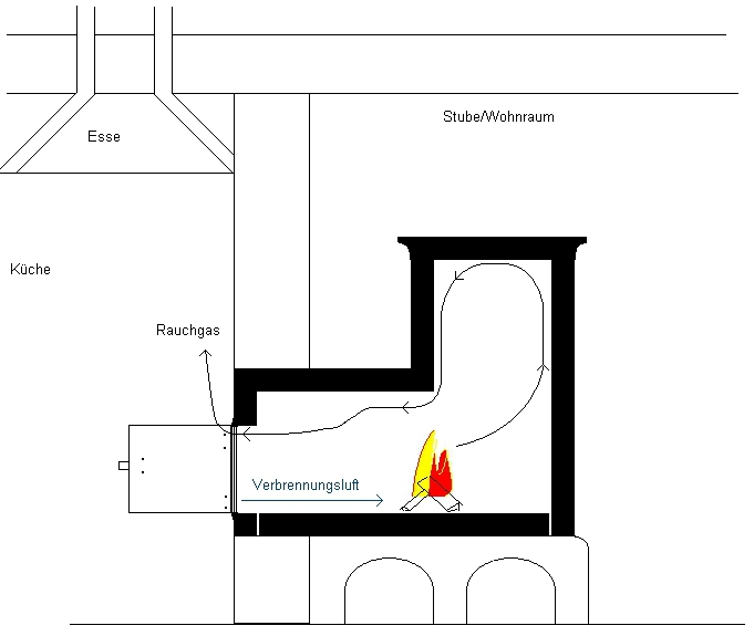 Funktionsweise alter Kachelöfen